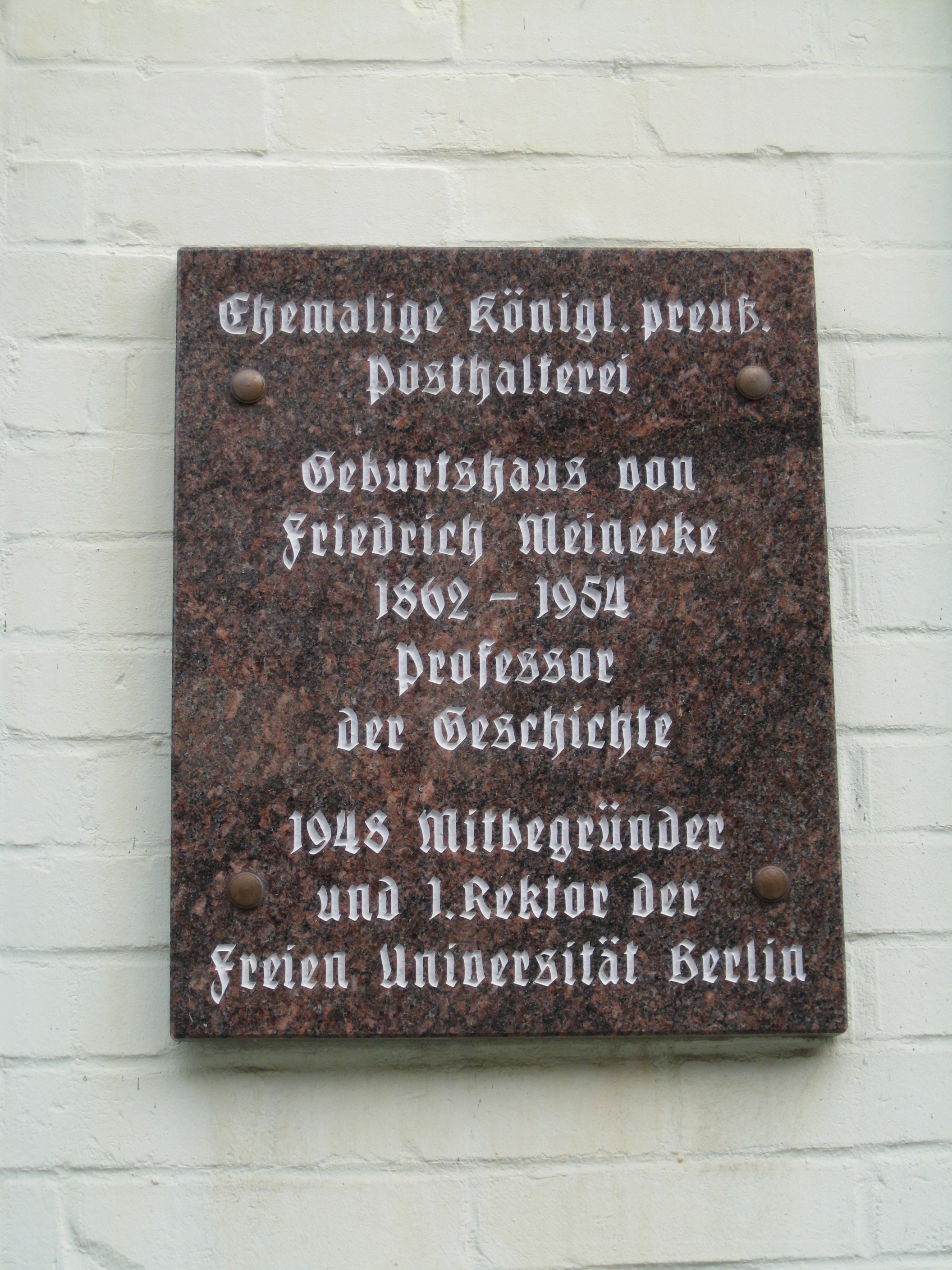 Inschrift an Meineckes Geburtshaus